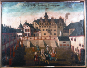 Birsteiner Schloss um 1820 (Gemälde)